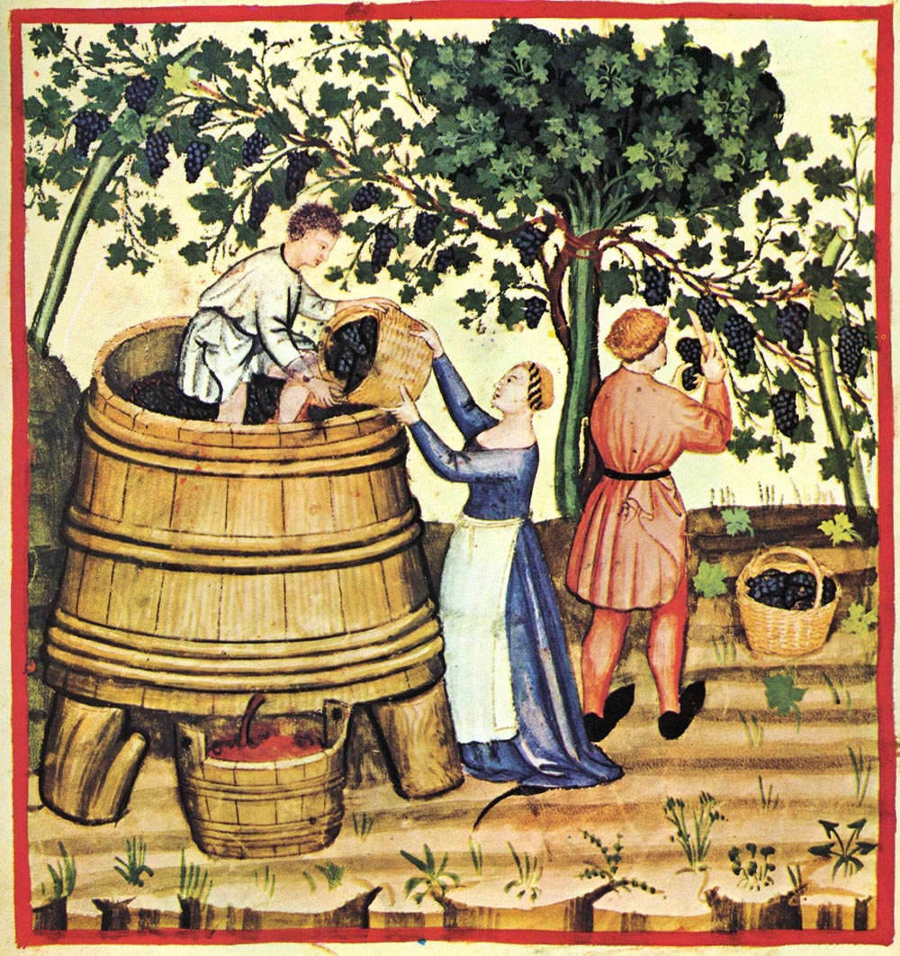 Tacuina sanitatis (XIV century) 9-autunno,Taccuino Sanitatis, Casanatense 4182.